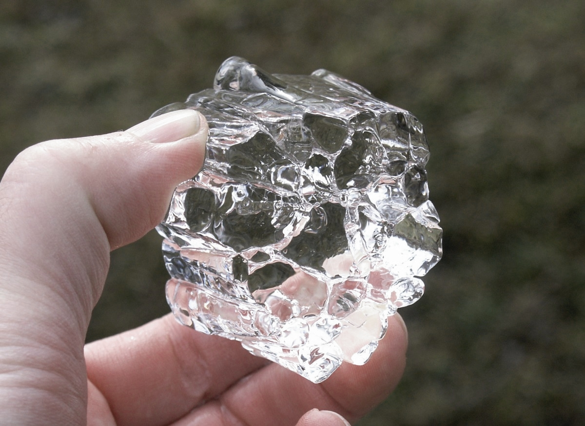 Wasser in kristalliner Form